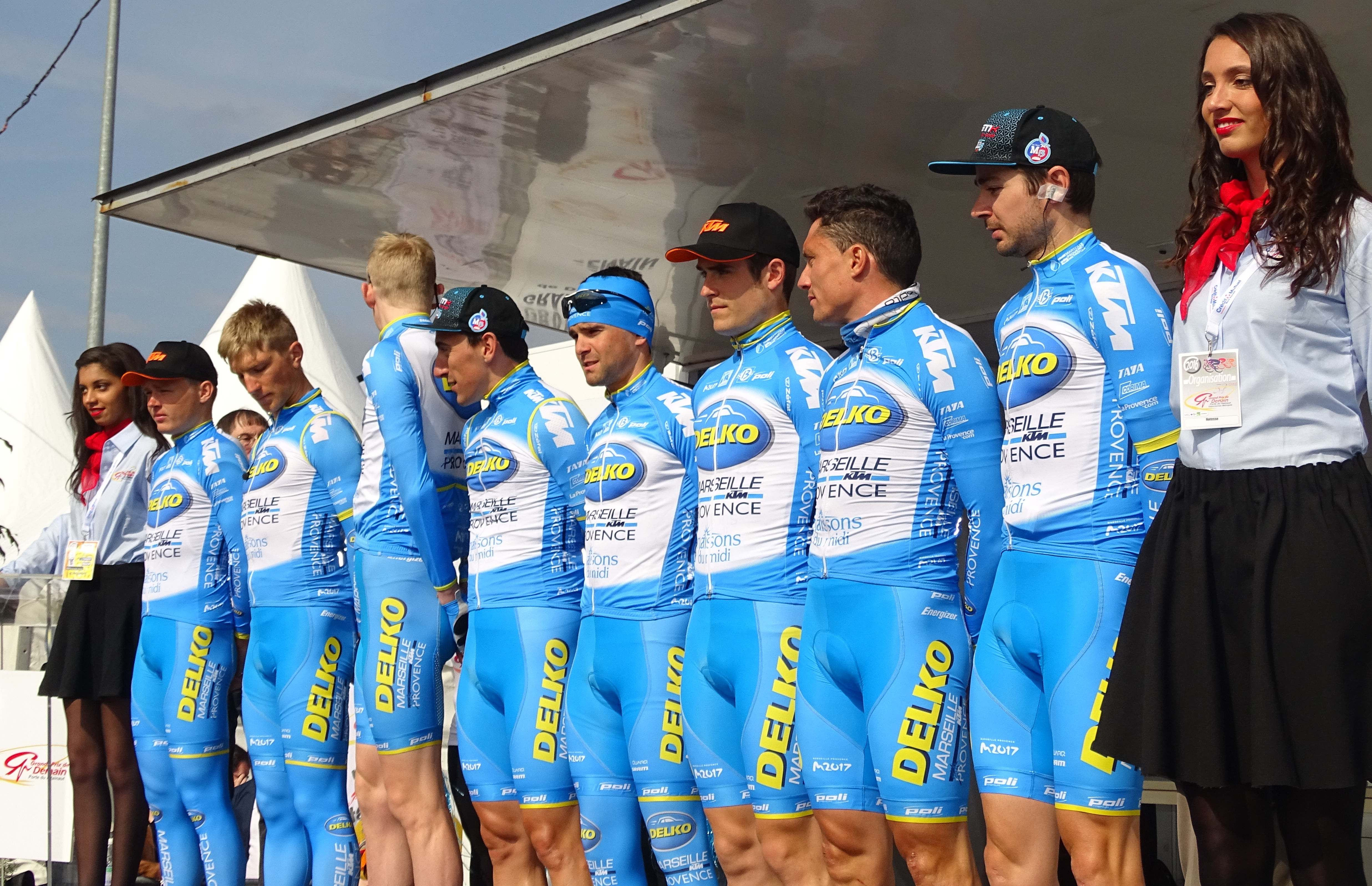 Reportage réalisé le jeudi 14 avril à l'occasion du départ et de l'arrivée du Grand Prix de Denain 2016 à Denain, Nord, Nord-Pas-de-Calais-Picardie, France.